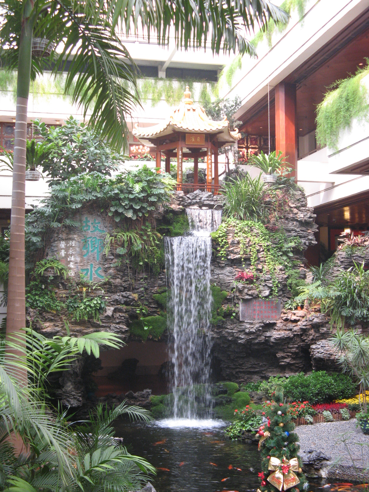 白天鹅宾馆内的室内园林